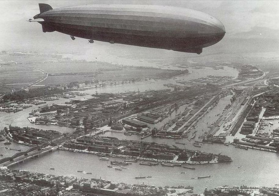 Graf Zeppelin' boven Rotterdam, 18 juni 1932